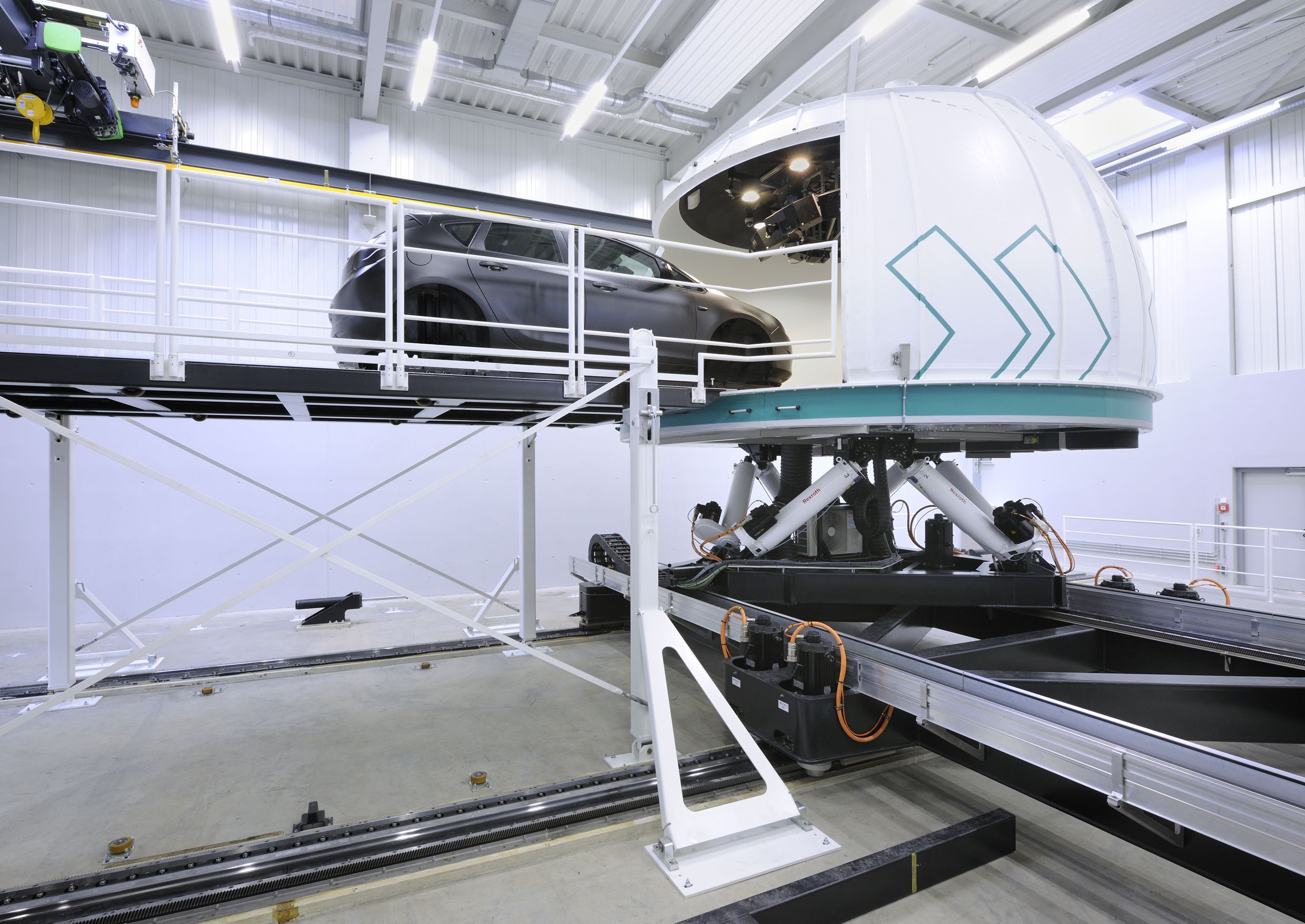 Der Stuttgarter Fahrsimulator für interaktive Fahrten mit einem realistischen Fahrgefühl.